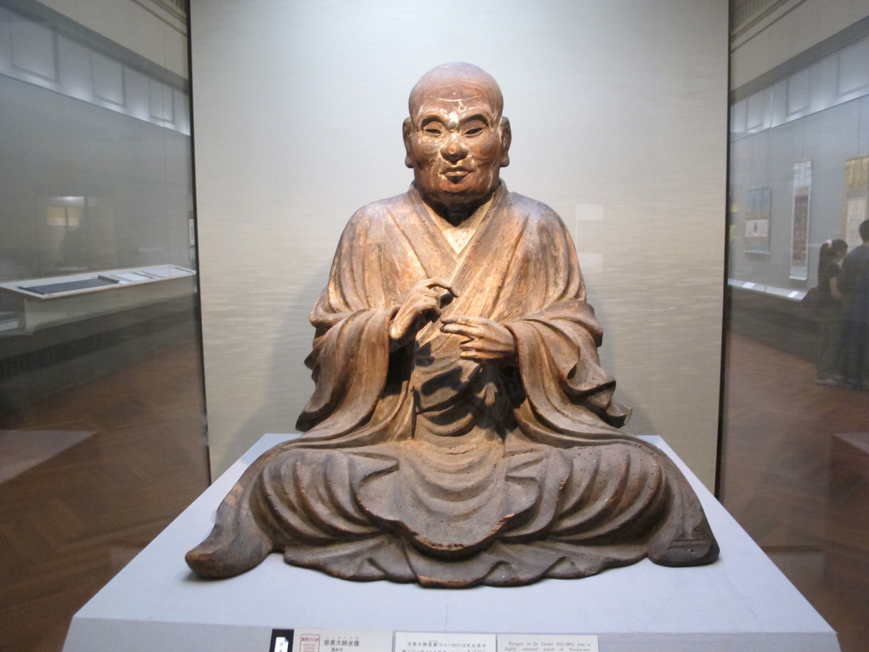 Periodo kamakura, jie daishi seduto, 1286